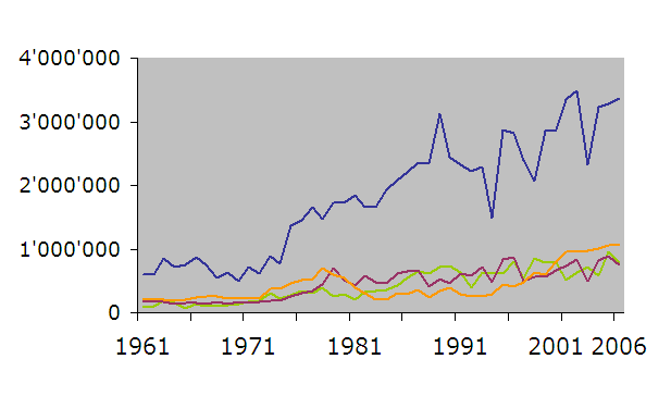 Food crops production in Tanzania. Legend: blue=maize; orange= sweet potatoes; plum= sorghum; green=rice Production vivrière en Tanzanie. Légende: bleu=mais; orange=patates douces; violet=sorgho; vert=riz